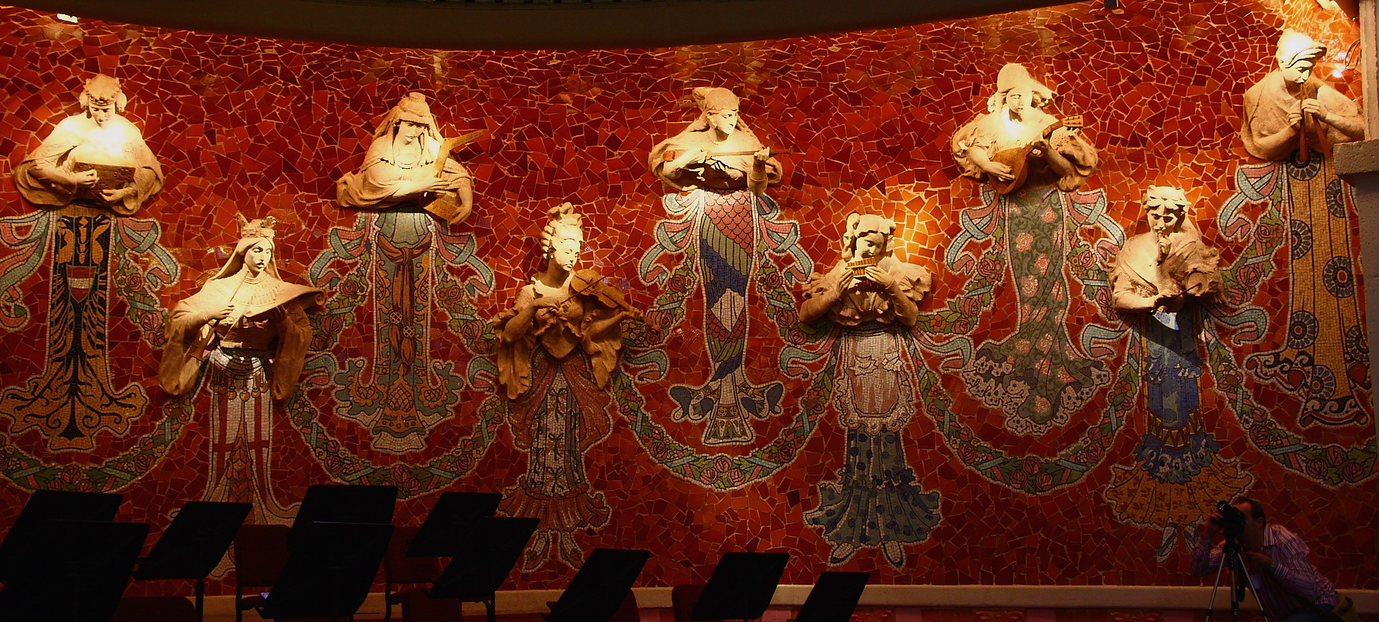 Palau de la Música - Detall de les muses de darrera de l'escenari, sobre un fons de trencadís. Part escultòrica superior per Eusebi Arnau i els mosaics de les faldilles per Mario Maragliano i Lluís Bru